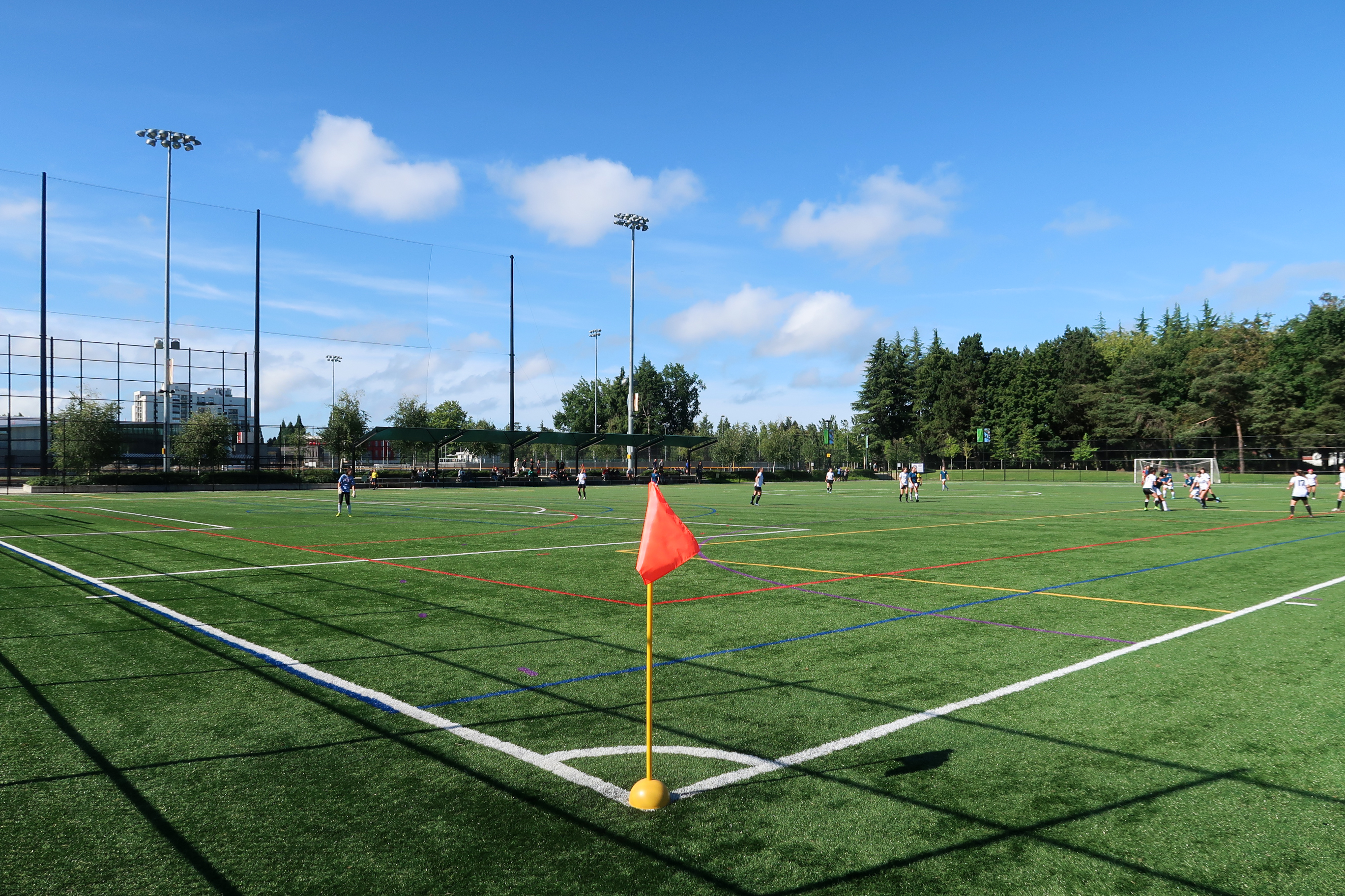 Minoru Park Latrace Field